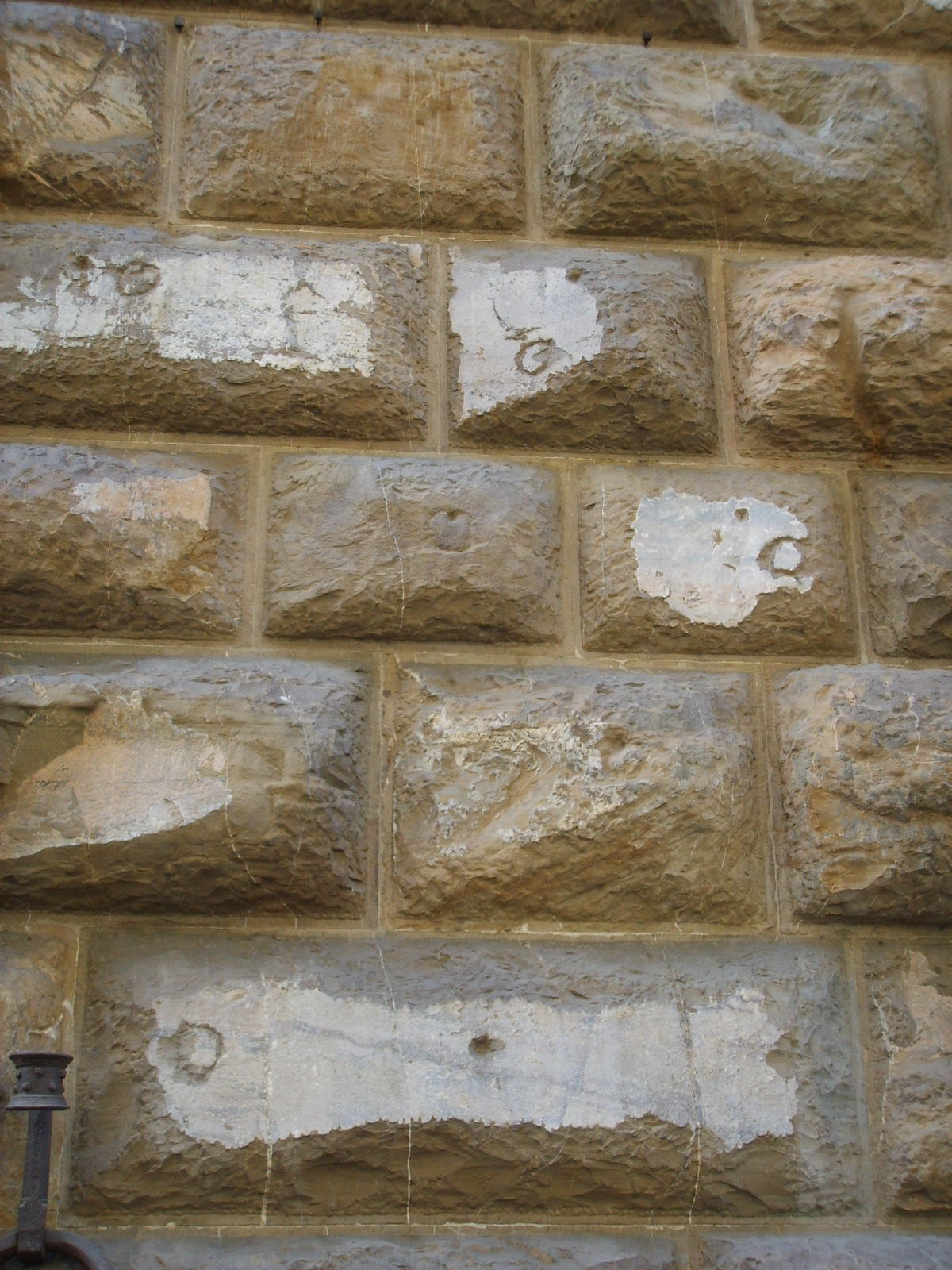 Palazzo medici riccardi, bugnato